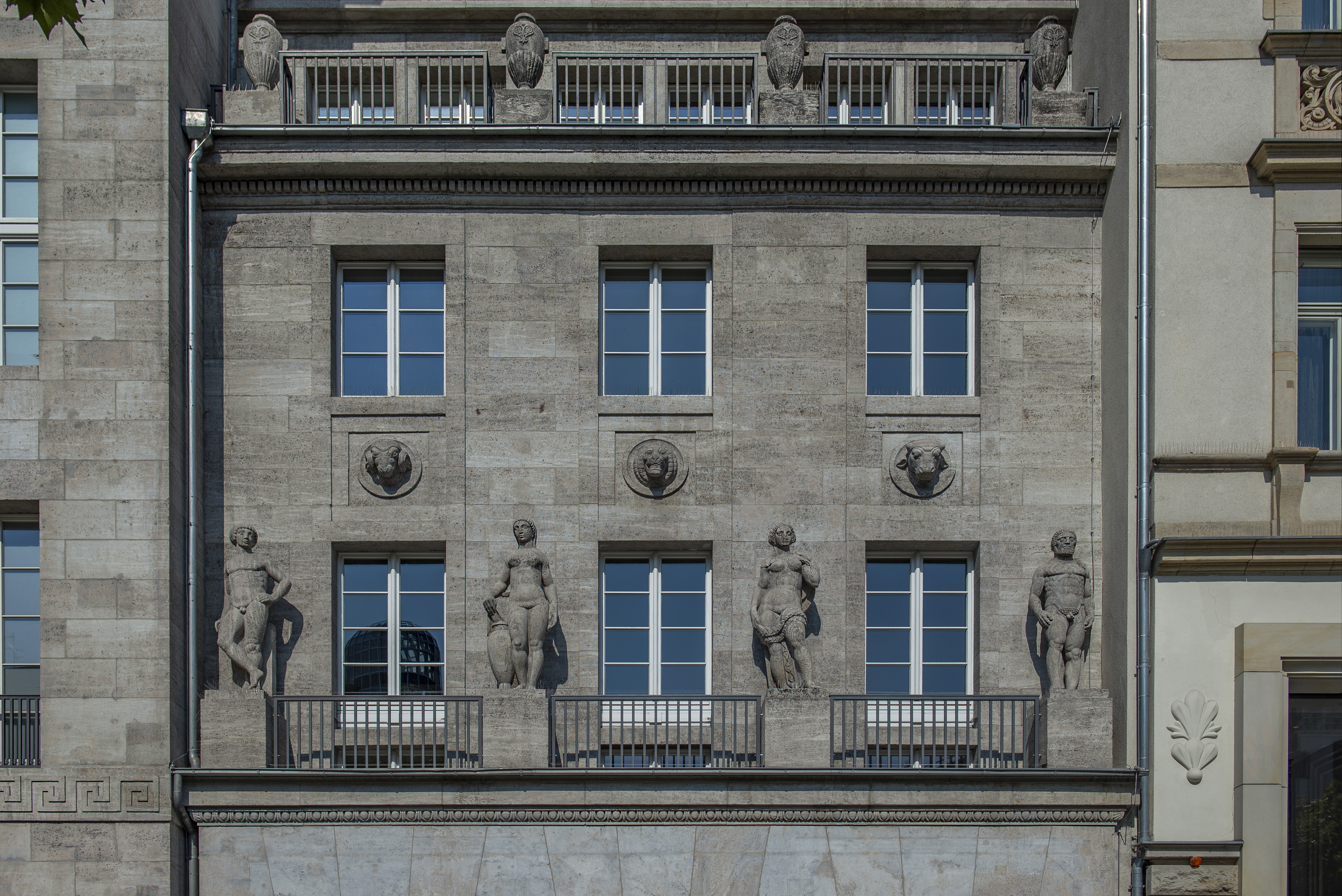 Union-Palast (ehem.) & Haus WienThis is a photograph of an architectural monument.